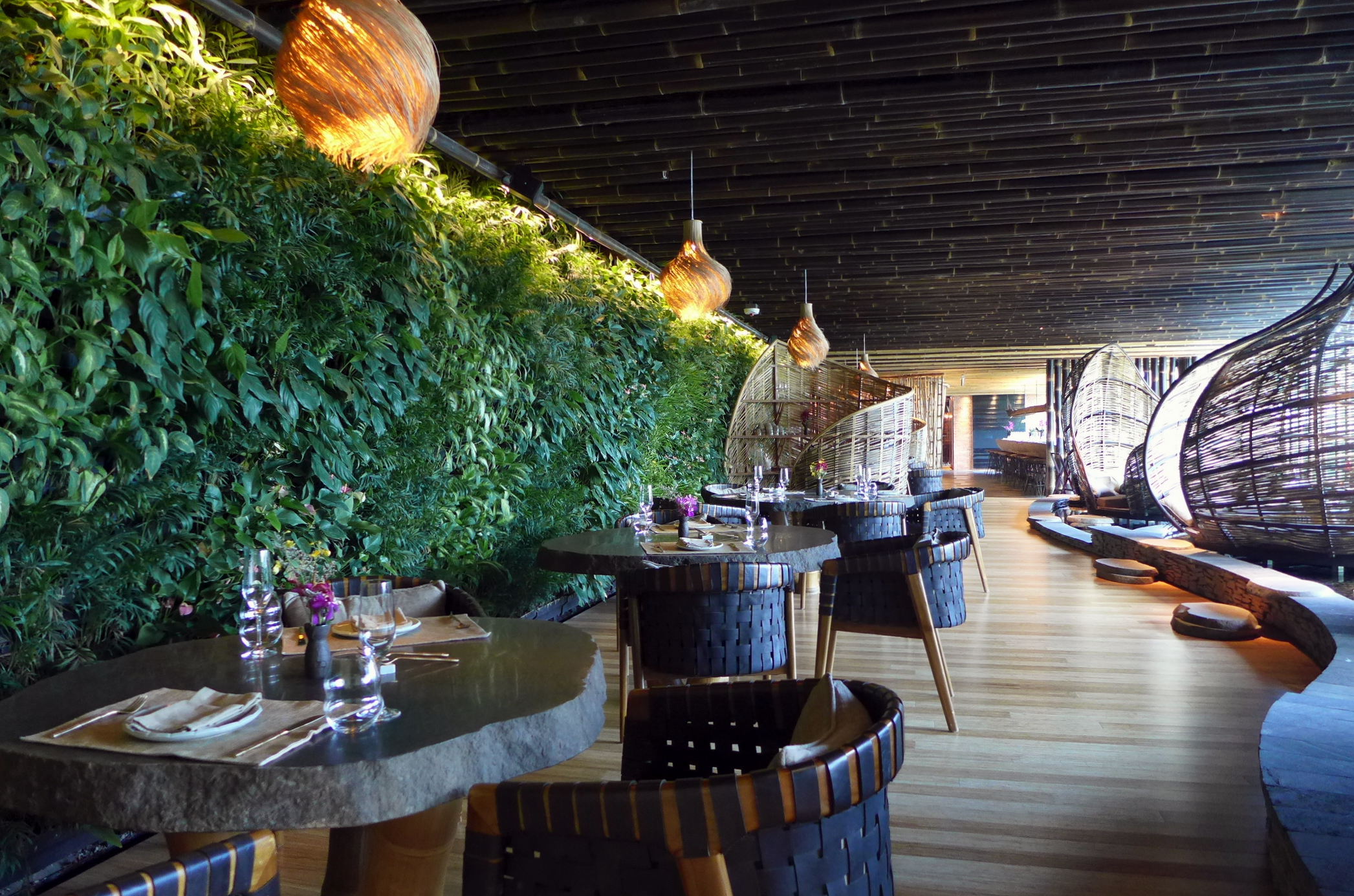 TRI Restaurant interior